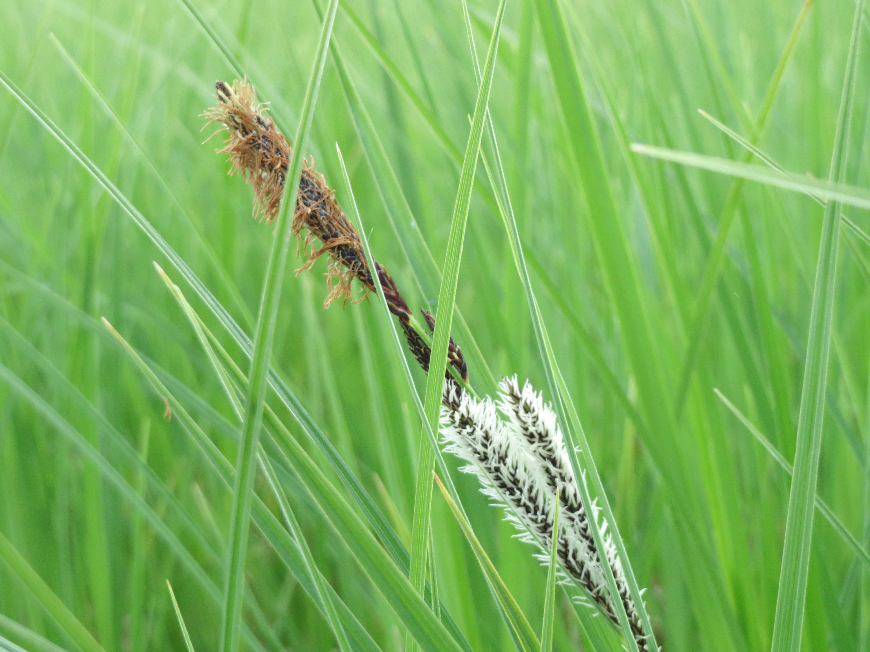 Schlank-Segge (Carex acuta) in den Horststückern (Hockenheimer Rheinbogen)